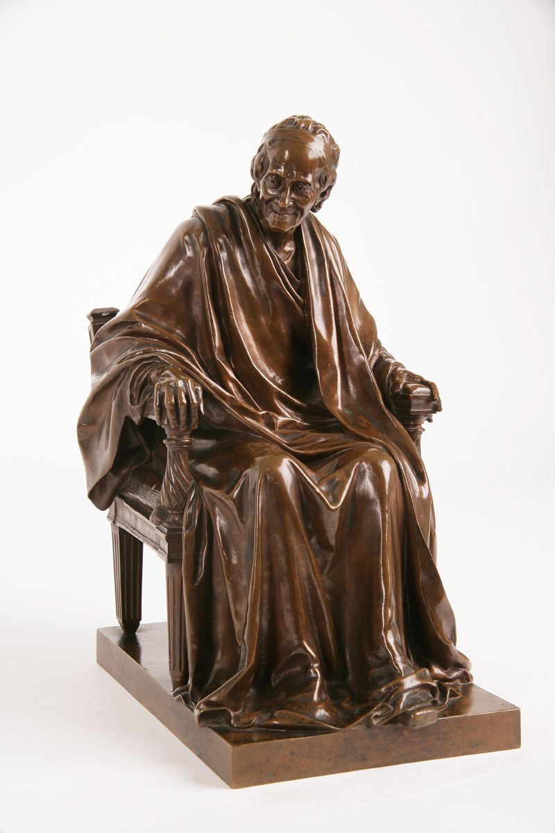 Бронза. 44х26х33